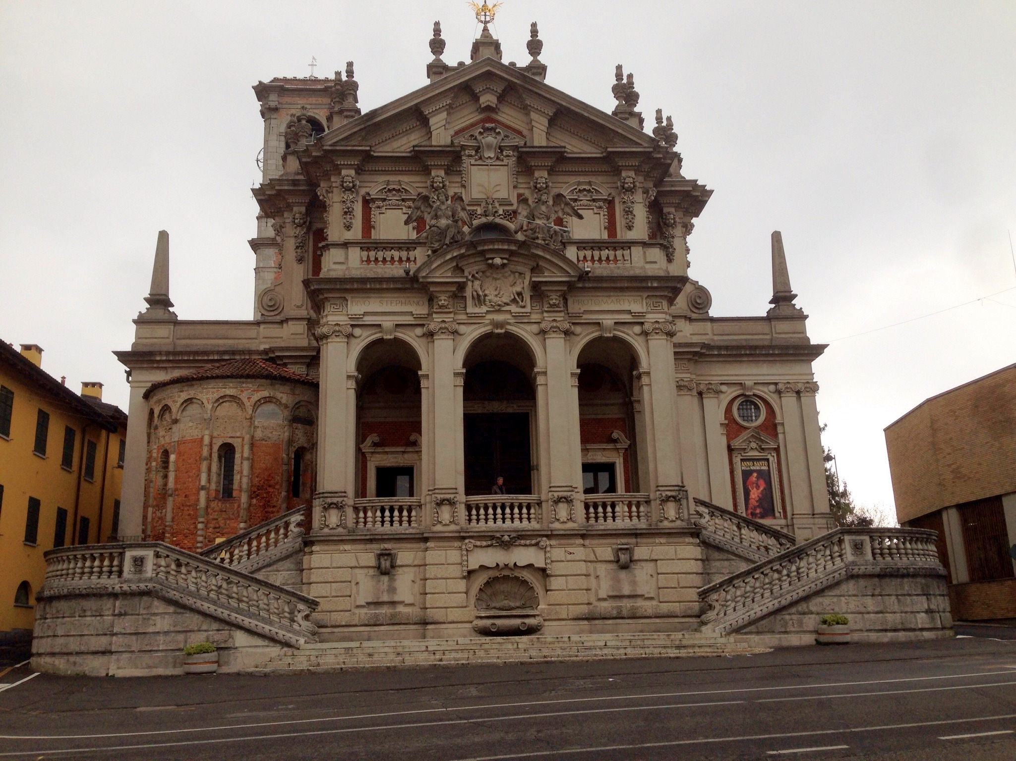 Appiano Gentile - Chiesa prepositurale di Santo Stefano